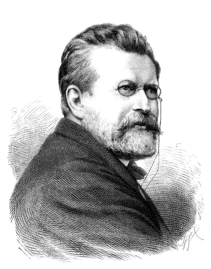 Porträt Ludwig Löffler. In: Über Land und Meer. Allgemeine illustrirte Zeitung. Herausgegeben von F. W. Häckländer. 18. Jahrgang, 2. Band Stuttgart 1876, Nr. 43.